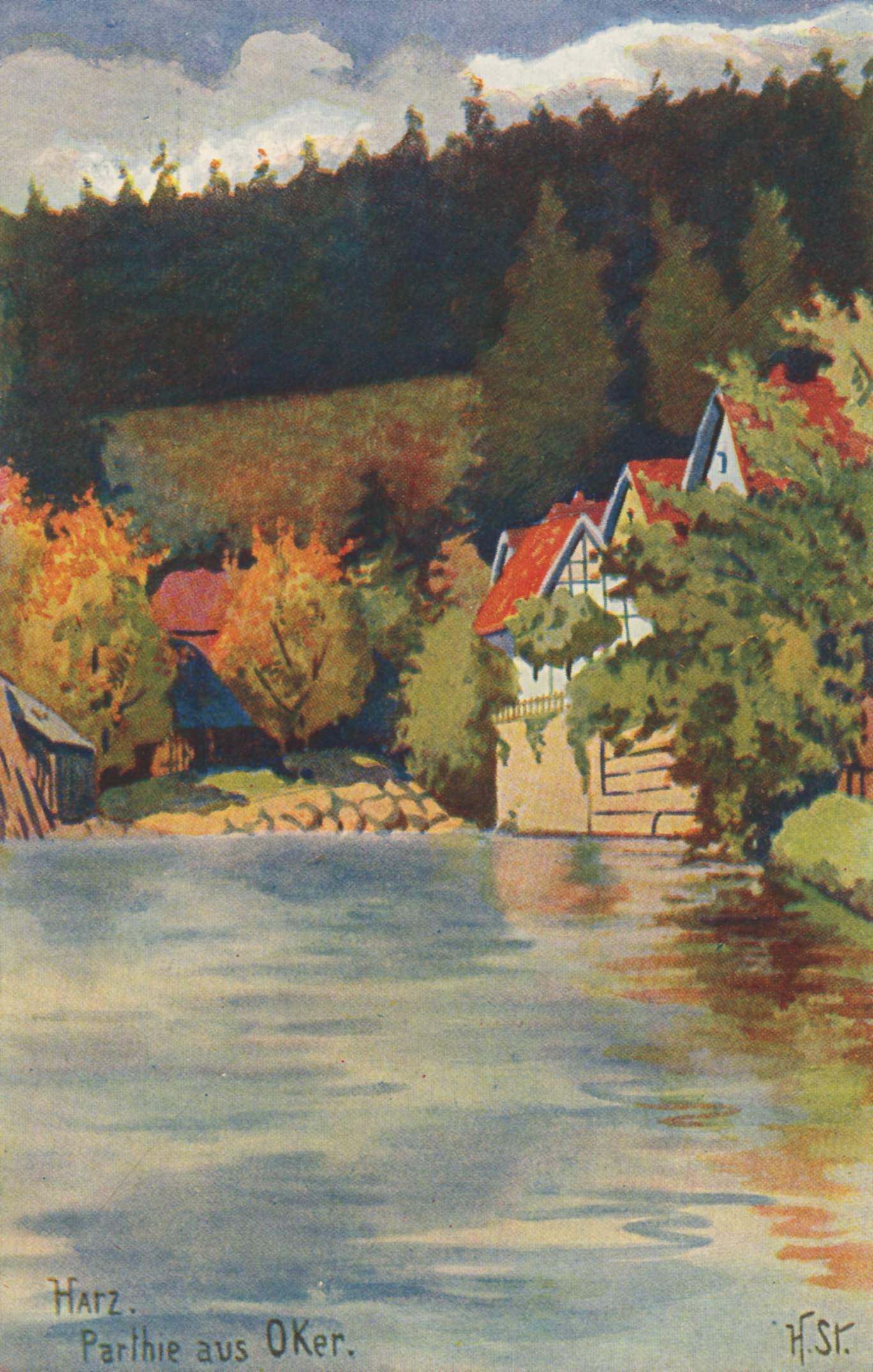 Partie aus Oker